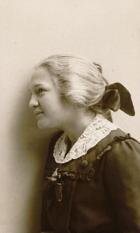 portrett, kvinne, skuespillerinne, brystbilde, profil.